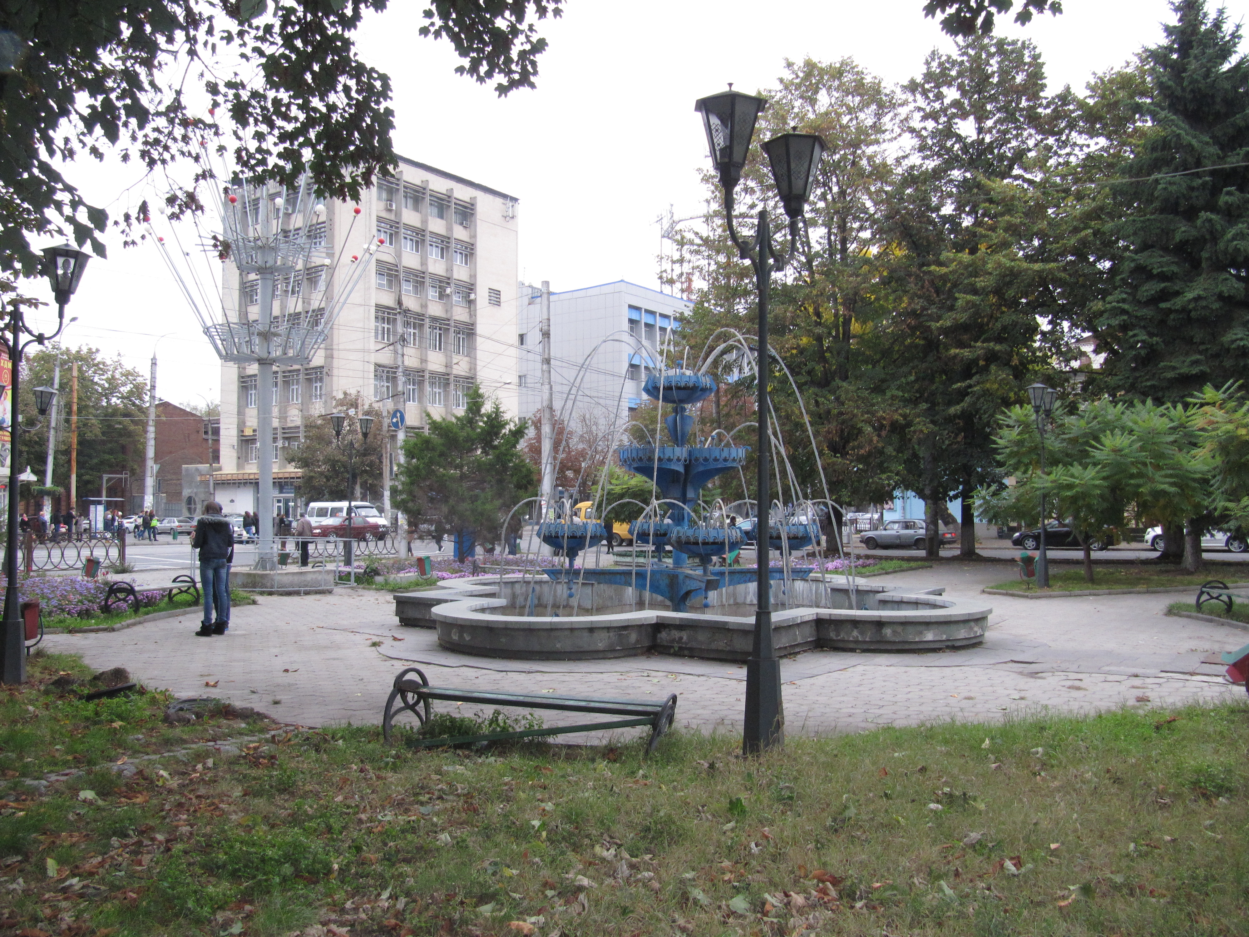 Фонтан на улице Кирова, Владикавказ